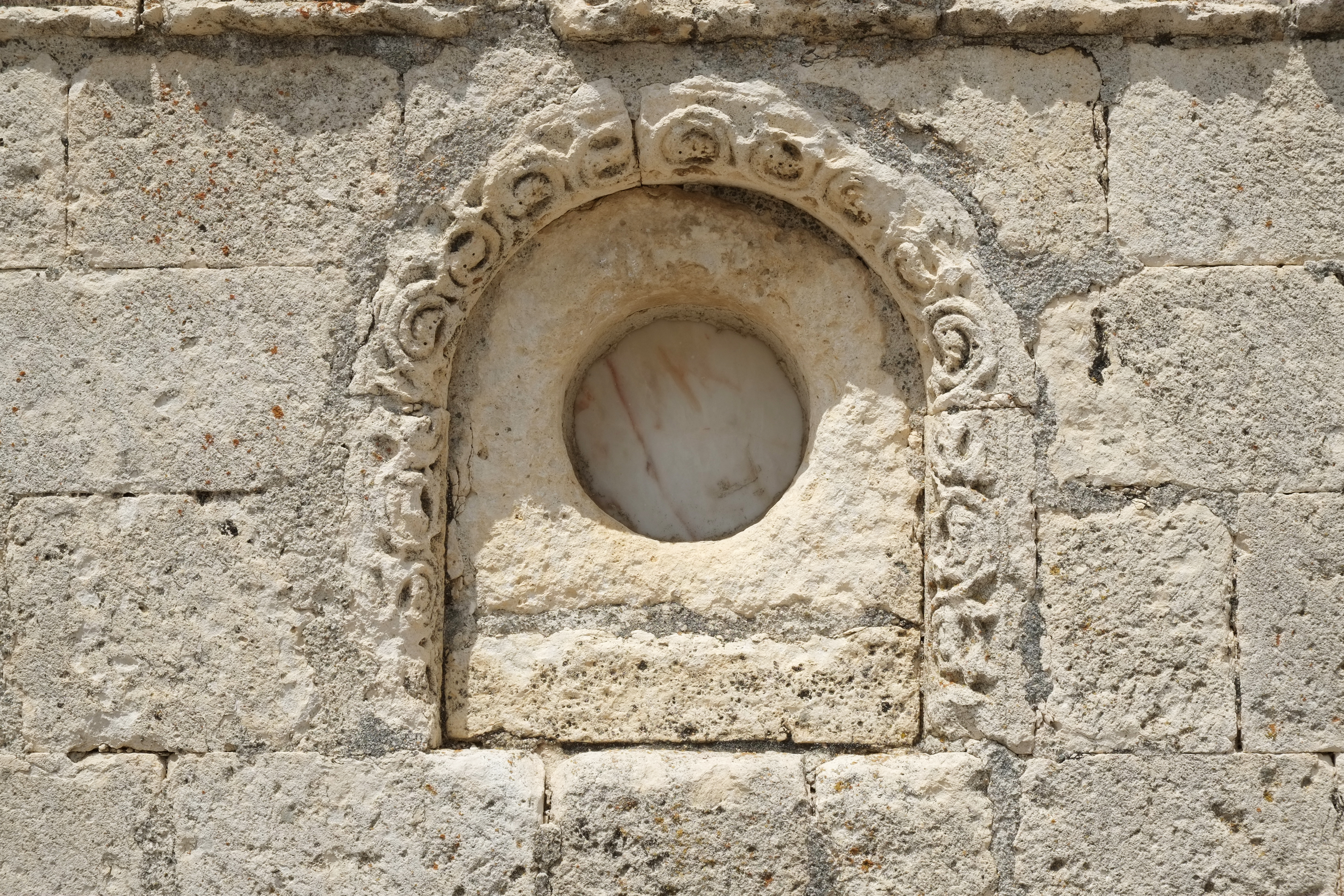 Kirche San Bartolomé in Campisábalos in der Provinz Guadalajara in Spanien